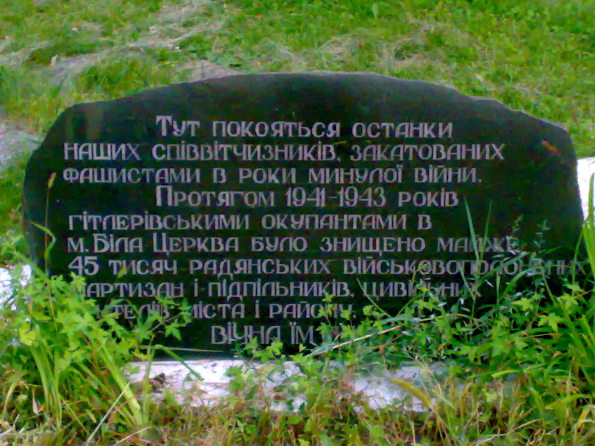 Пам'ятний знак закатованим гітлерівцями жителям міста, військовополоненим і підпільникам.